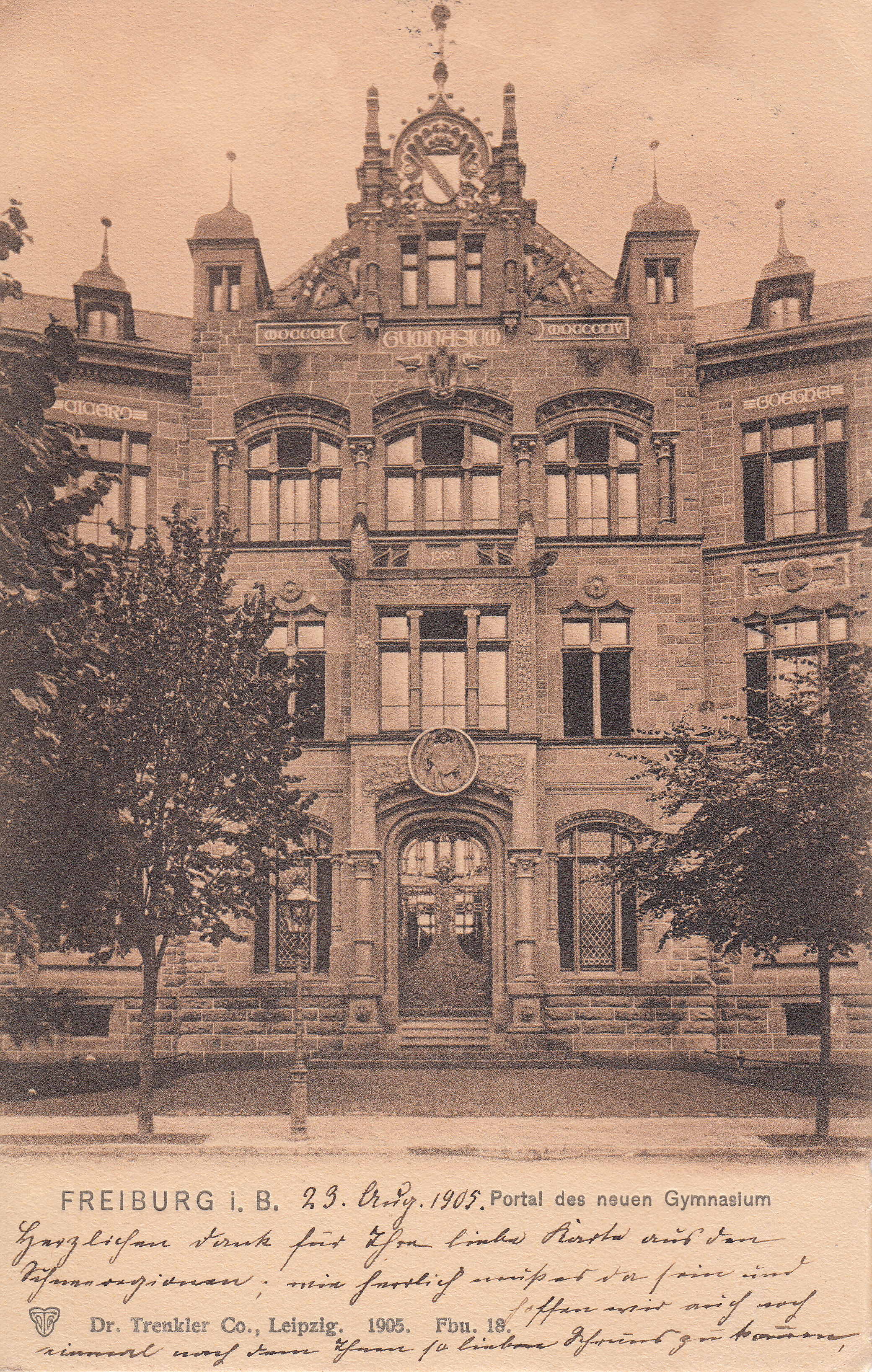 Historische Ansicht (Vorderseite / Nordseite) des Friedrich-Gymnasiums (Freiburg im Breisgau. Abbildung des Friedrich-Gymnasiums Freiburg (im Breisgau) [FG].)